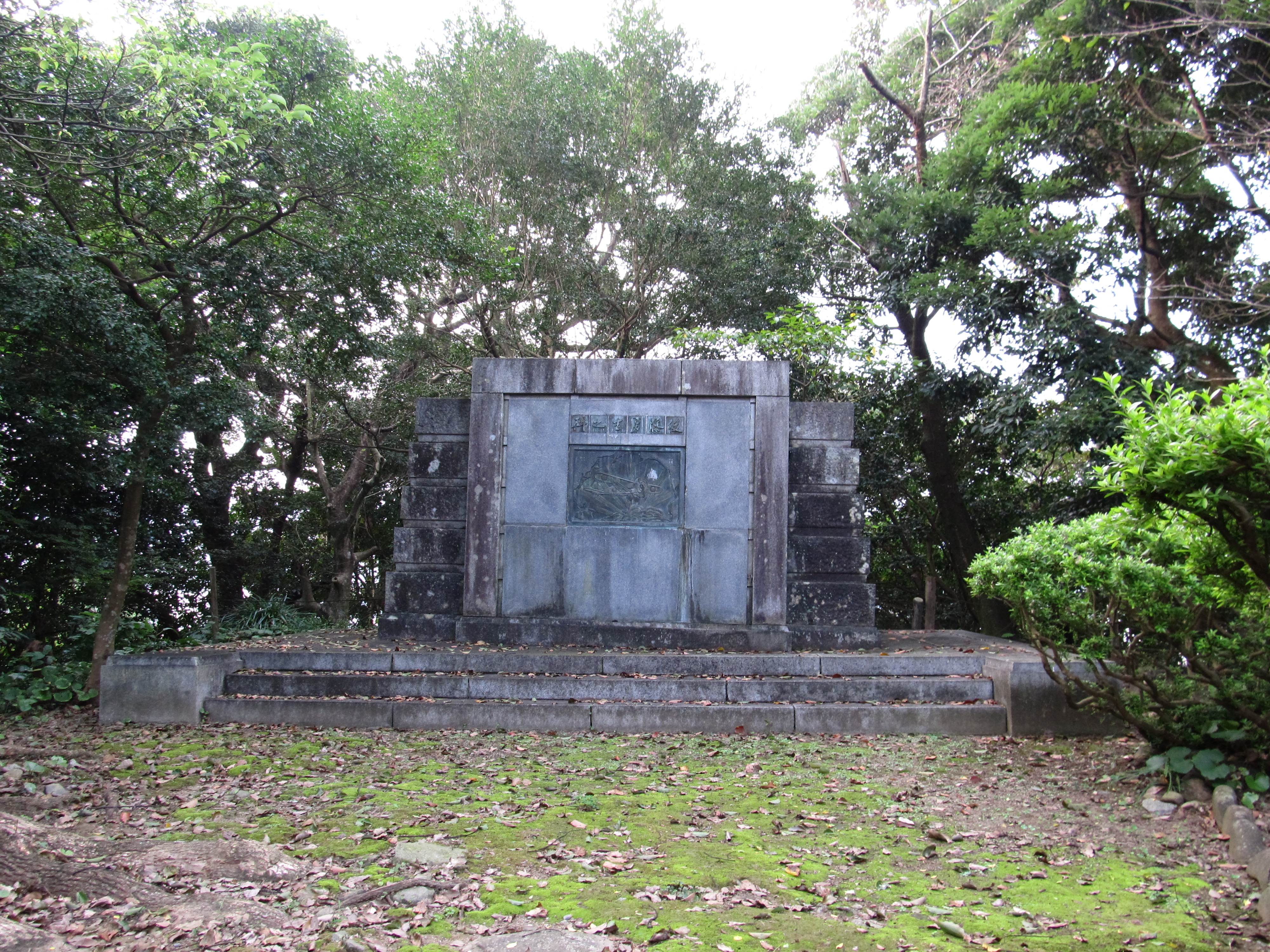 宮崎県延岡市の城山公園（延岡城跡）にある、後藤勇吉を顕彰したレリーフ。